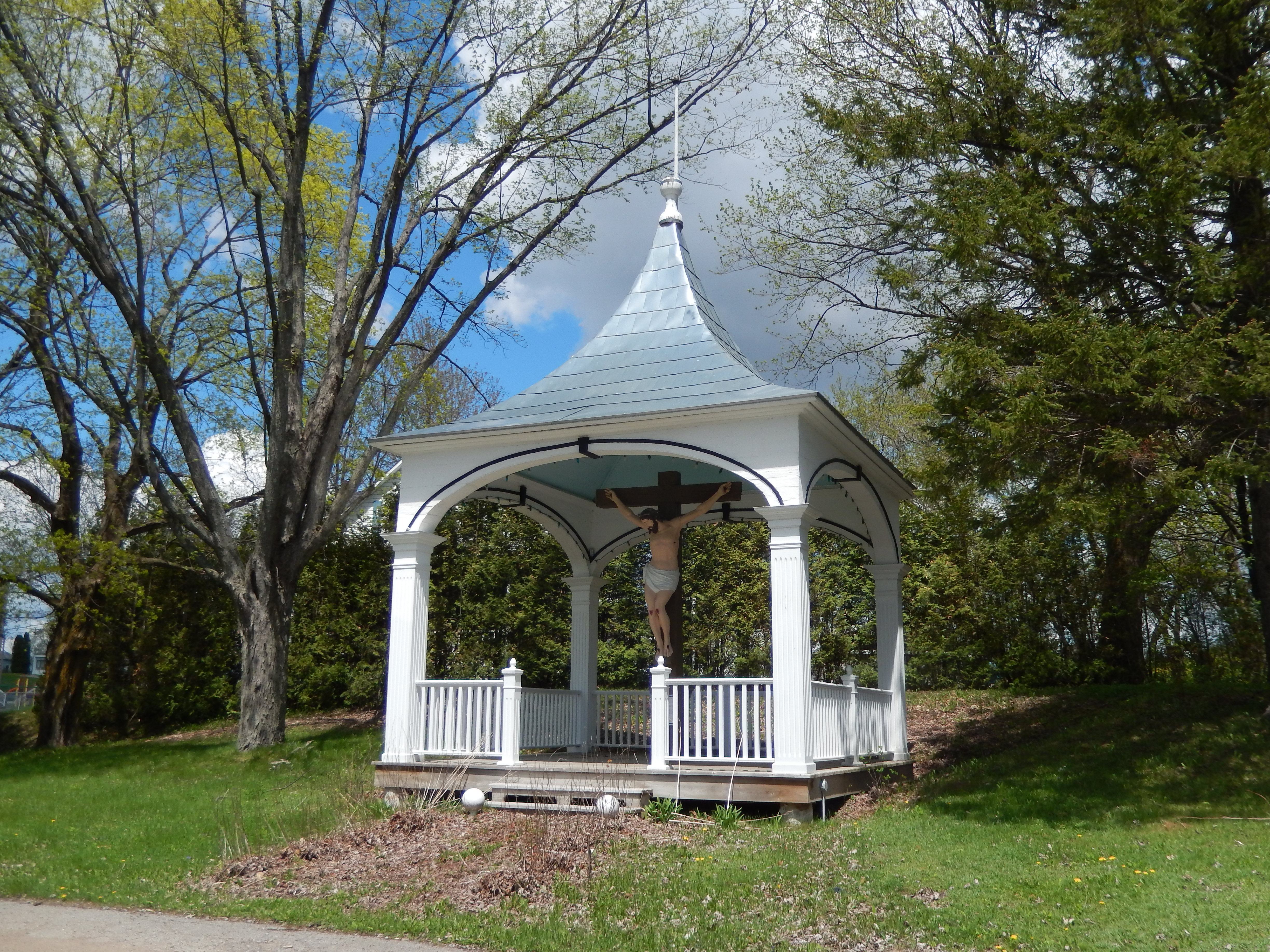 Calvaire de la Rivière-à-Veillet, Rue Principale, Sainte-Geneviève-de-Batiscan (Canada). (Protection IP cité. Voir la liste des lieux patrimoniaux de la Mauricie pour plus de détails).